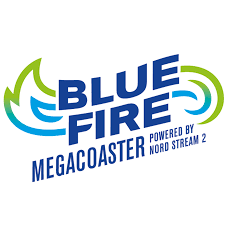 Logo 2020 de Blue Fire